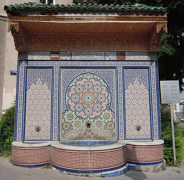 Marokkanerbrunnen in der Marokkanergasse in Wien-Landstraße